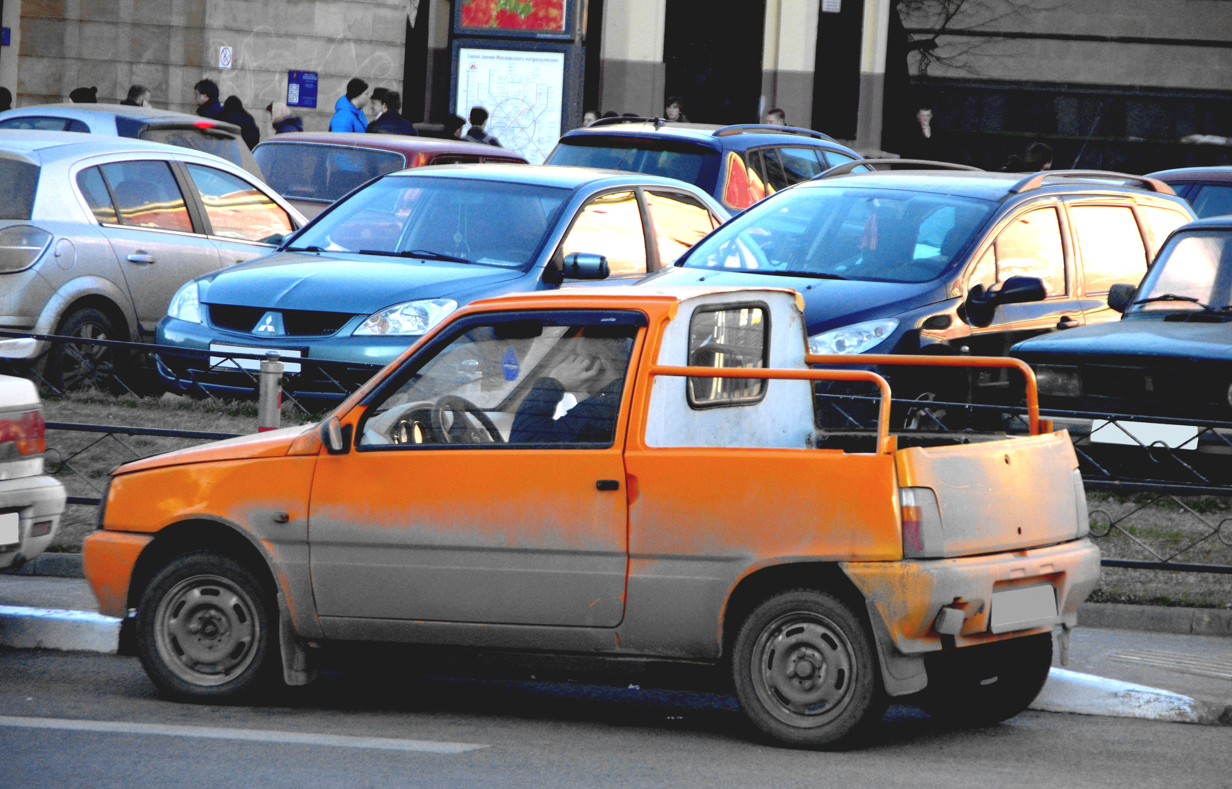 Автомобиль Ока в исполнении пикапа